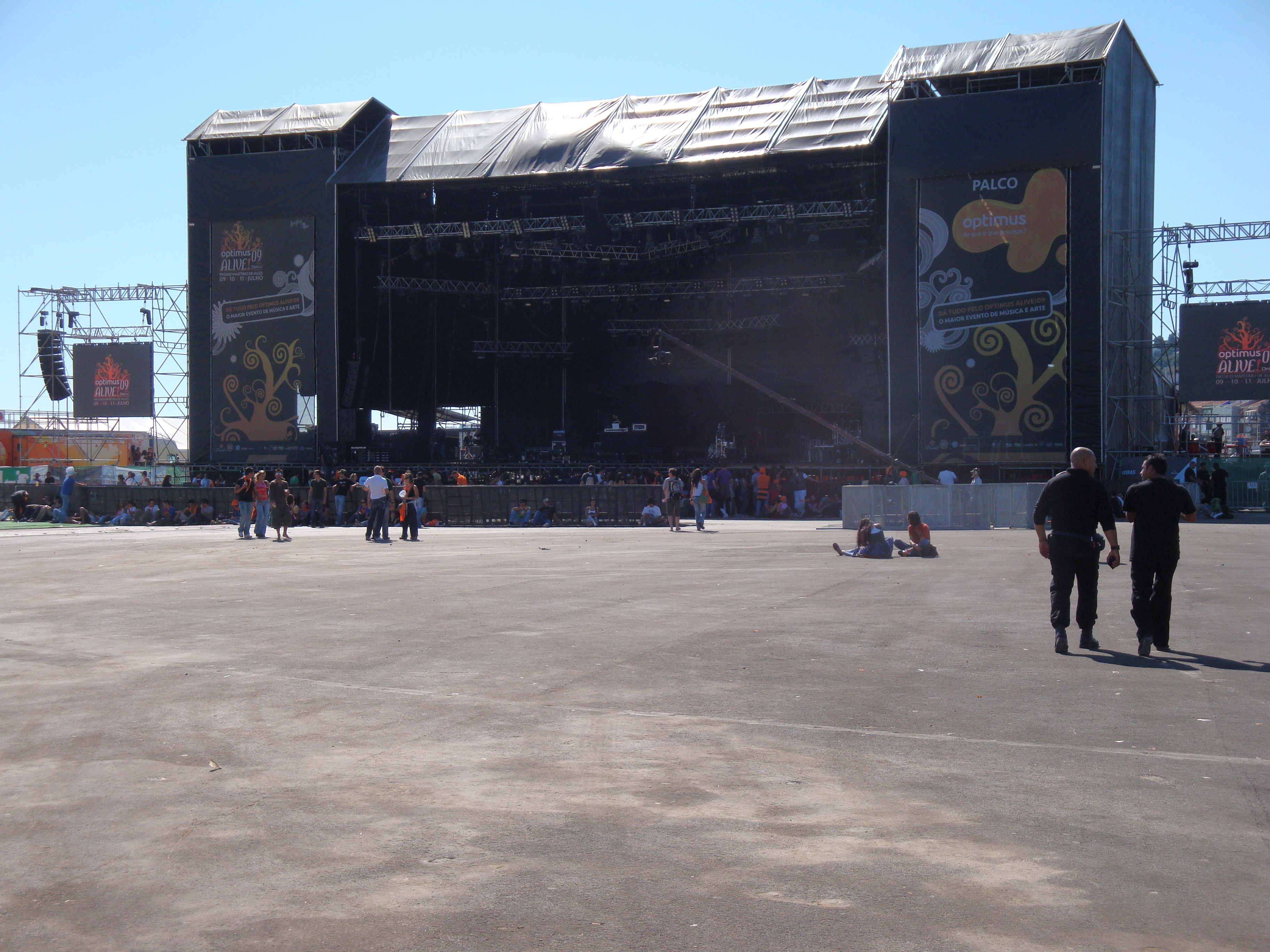 Palco principal do festival de música Optimus Alive! 2009